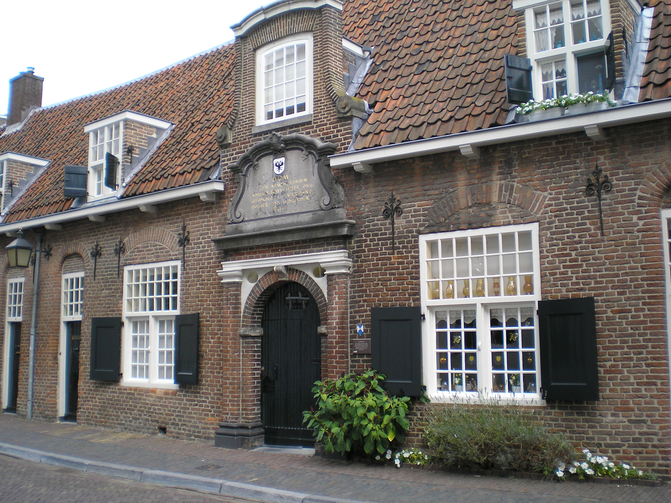 Beyerskameren te Utrecht in Nederland